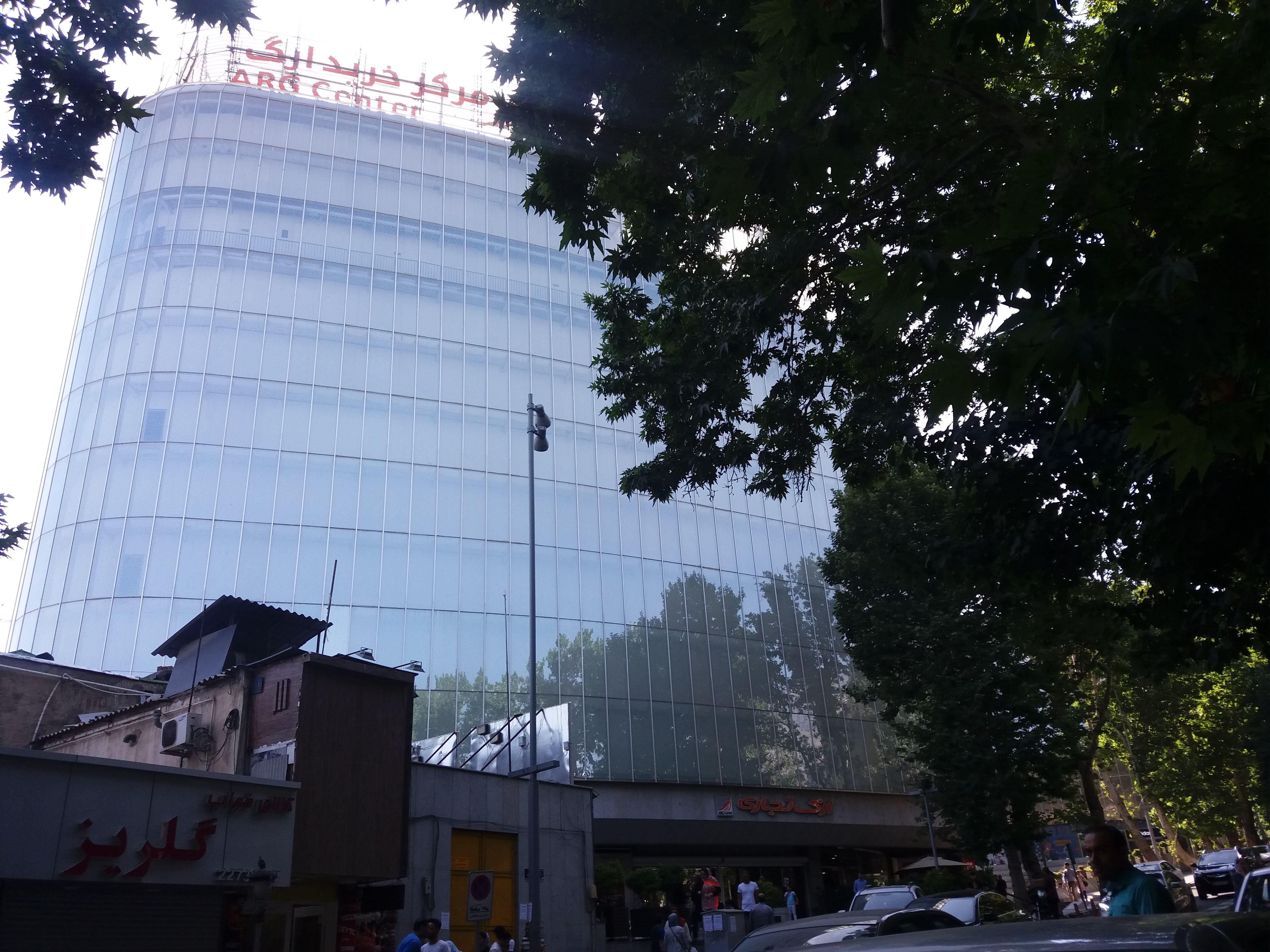 مرکز خرید ارگ - تجریش - تهران - ۱۳۹۶